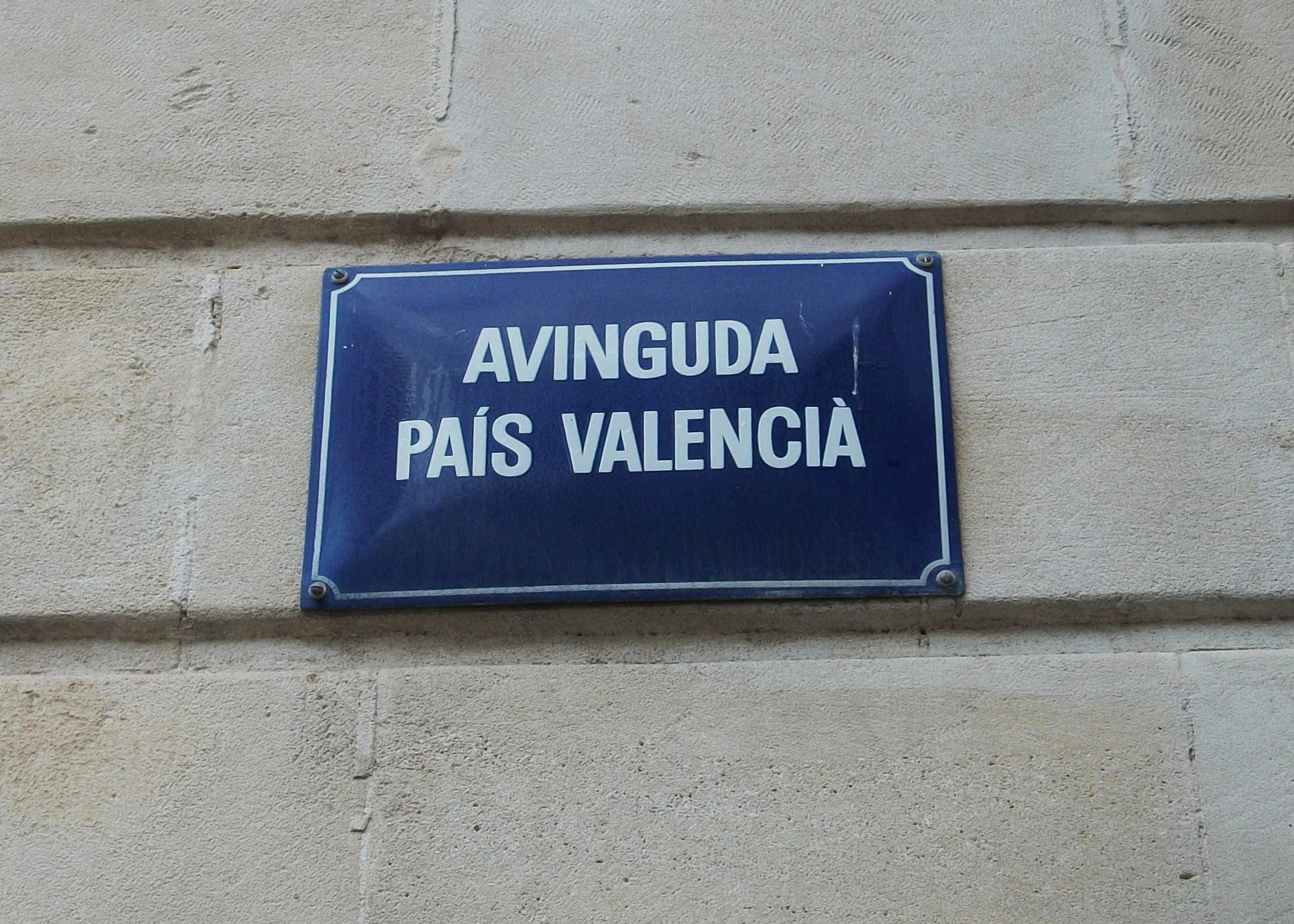 Placa de l'Avinguda del País Valencià d'Alcoi.